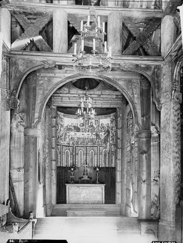 Gol stavkyrkje, interiør (Interiors of Gol stave church, Norsk folkemuseum, Bygdøy, Oslo, Norway. Originally Gol, Buskerud fylke). Picture taken in the periode 1880 - 1890.